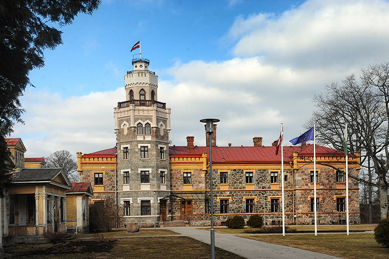 Castello di Sigulda